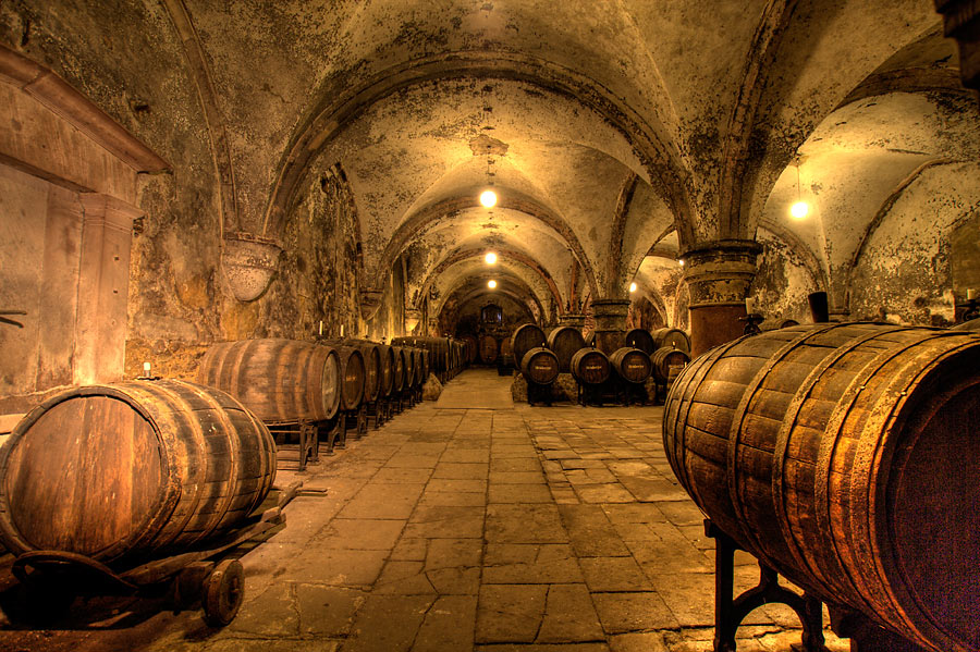 Fraternei oder auch Cabinetkeller im Kloster Eberbach[1]